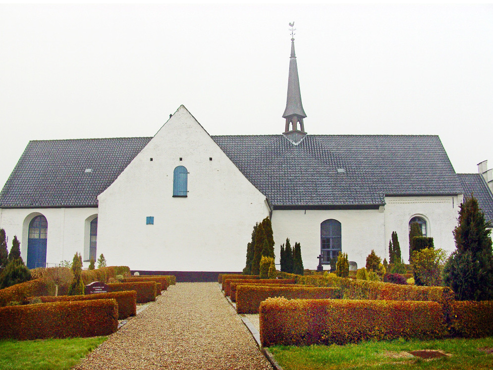 fra nord